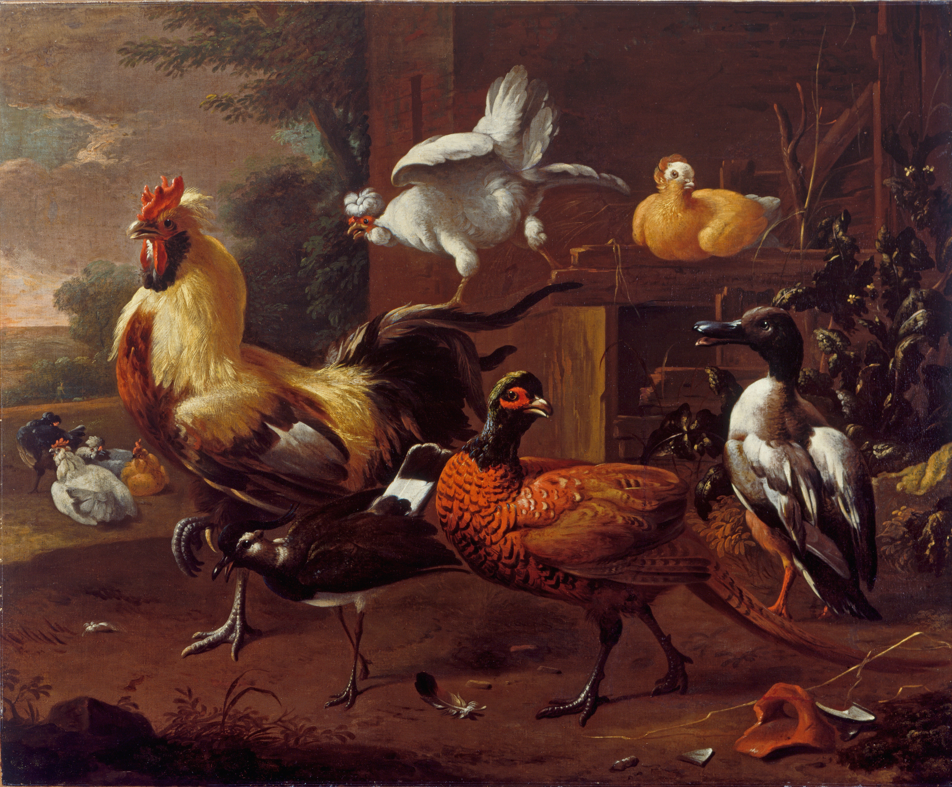 Hühnerhof